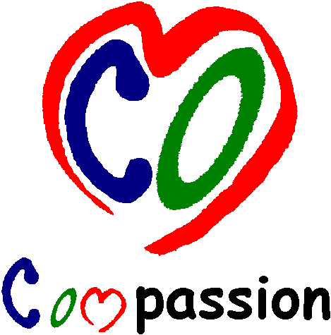 Logo des Compassion-Projekts der Schulstiftung der Erzdiözese.